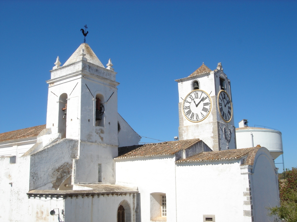 Tavira Valter Jacinto